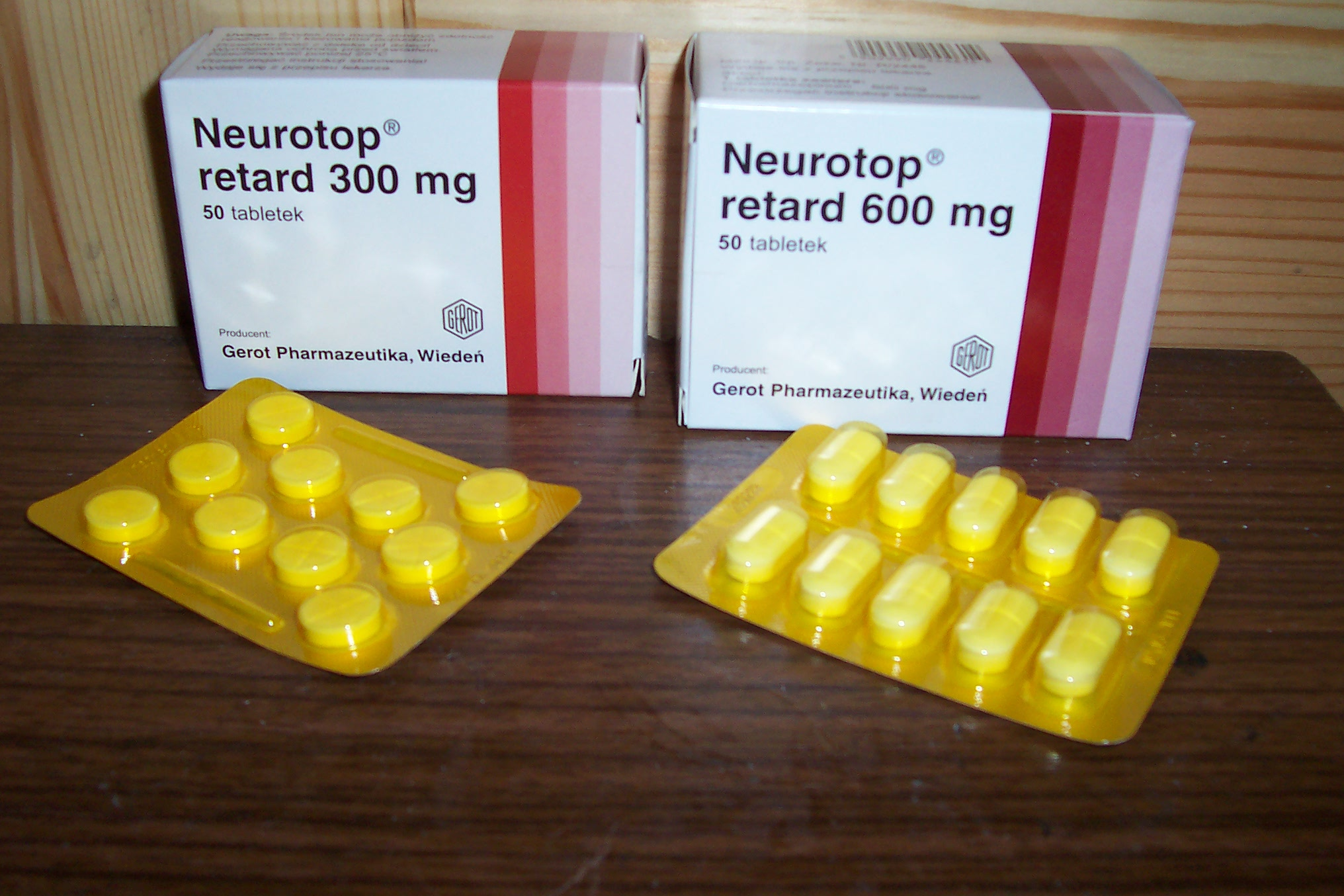 Neurotop 300 and 600mg pills